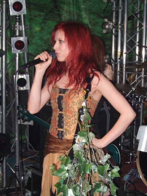 Jonsu von der finnischen Band Indica